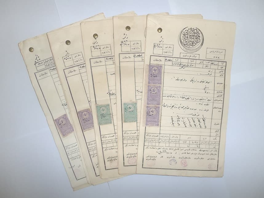 הקושאנים המקוריים על אדמות הברון רוטשילד בחורן